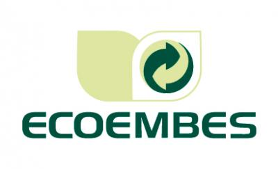 Logo de Ecoembes, una organización sin ánimo de lucro que cuida del medio ambiente a través del reciclaje y el ecodiseño de los envases.